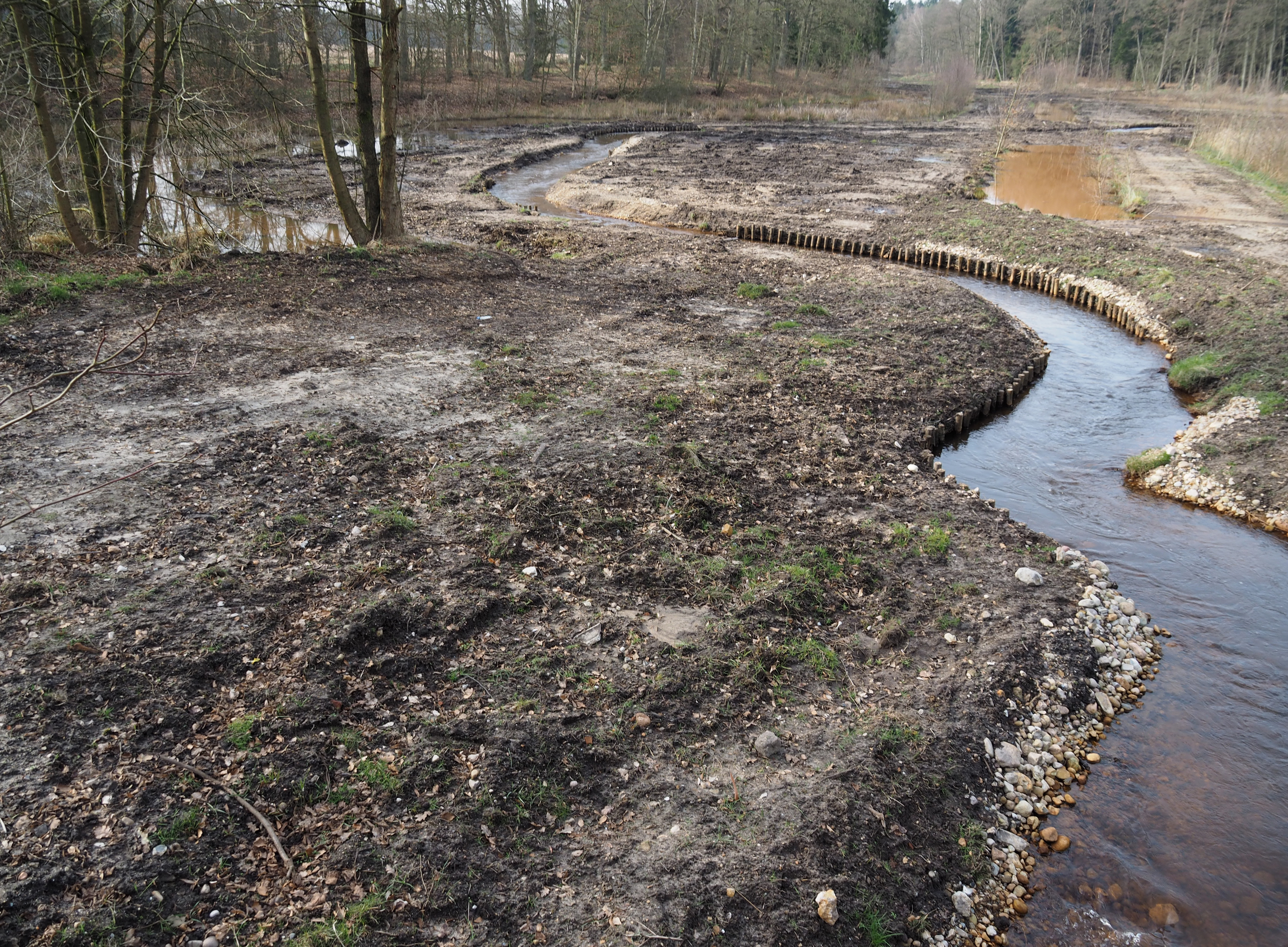 Renaturierter Liethbach auf dem Truppenübungsplatzes Bergen, nahe Schloss Bredebeck